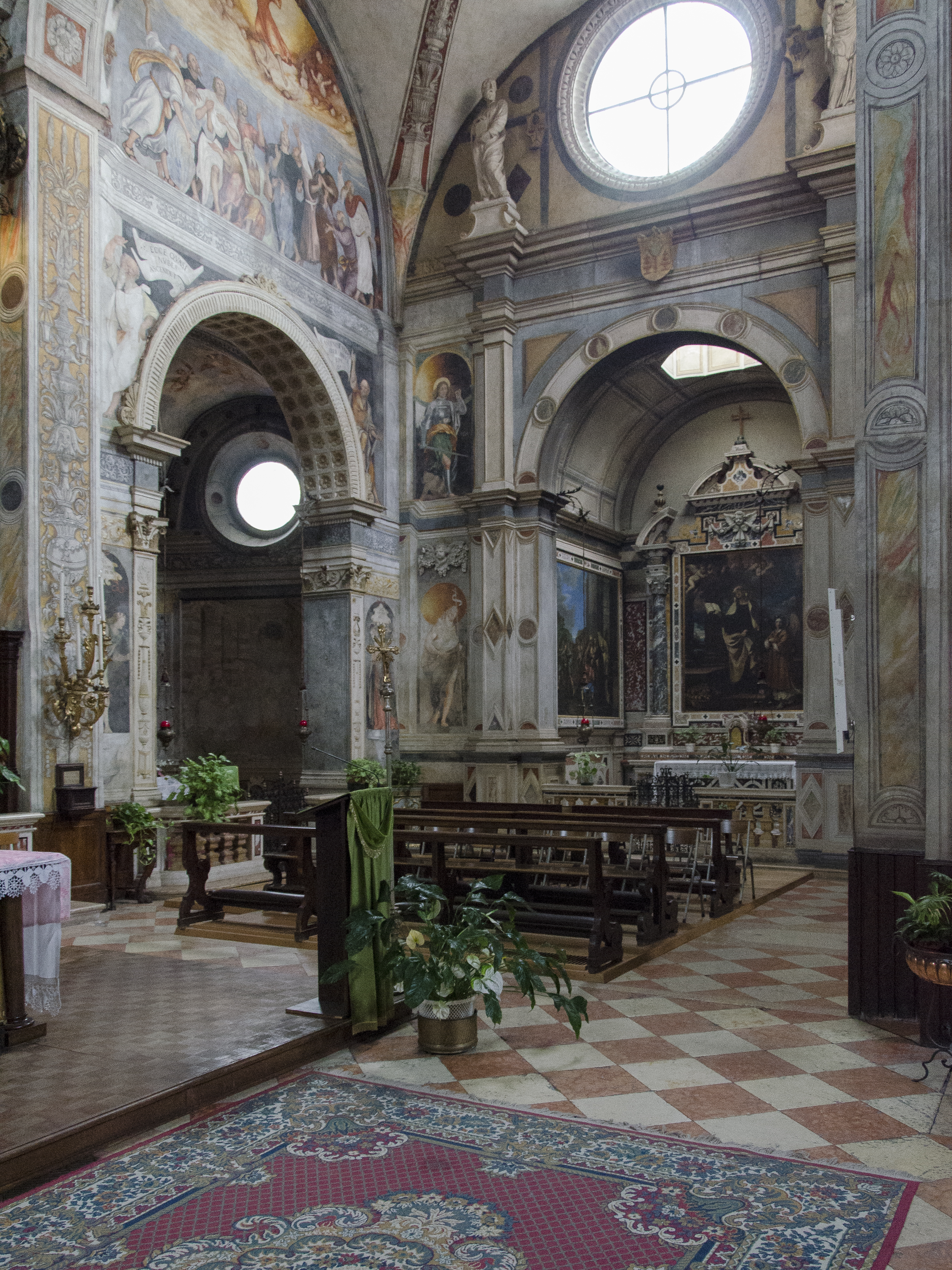 Veduta dell'interno